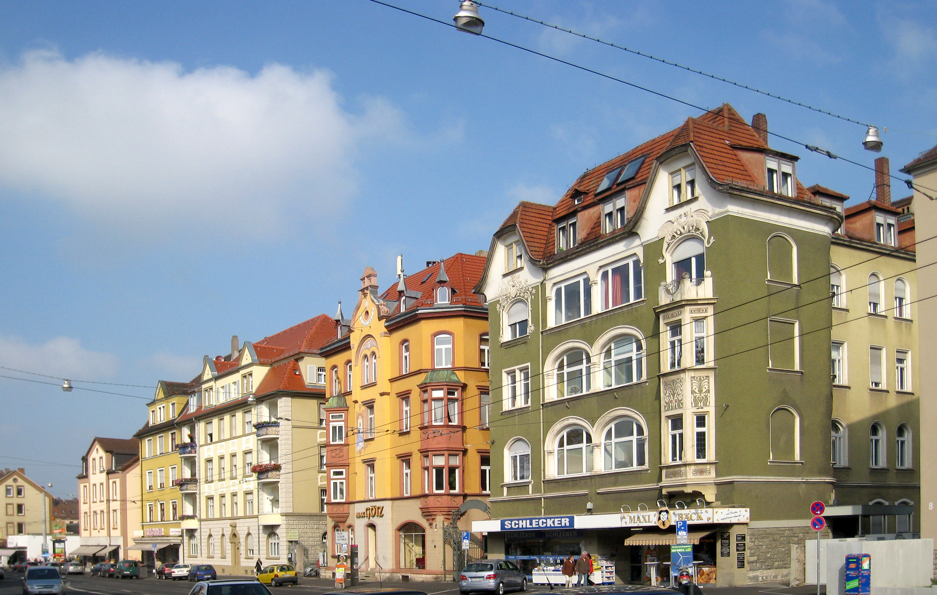 Frankfurter Straße in der Zellerau (Würzburg)